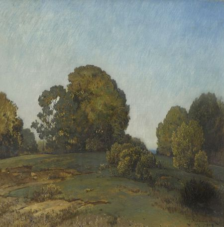 Landscape